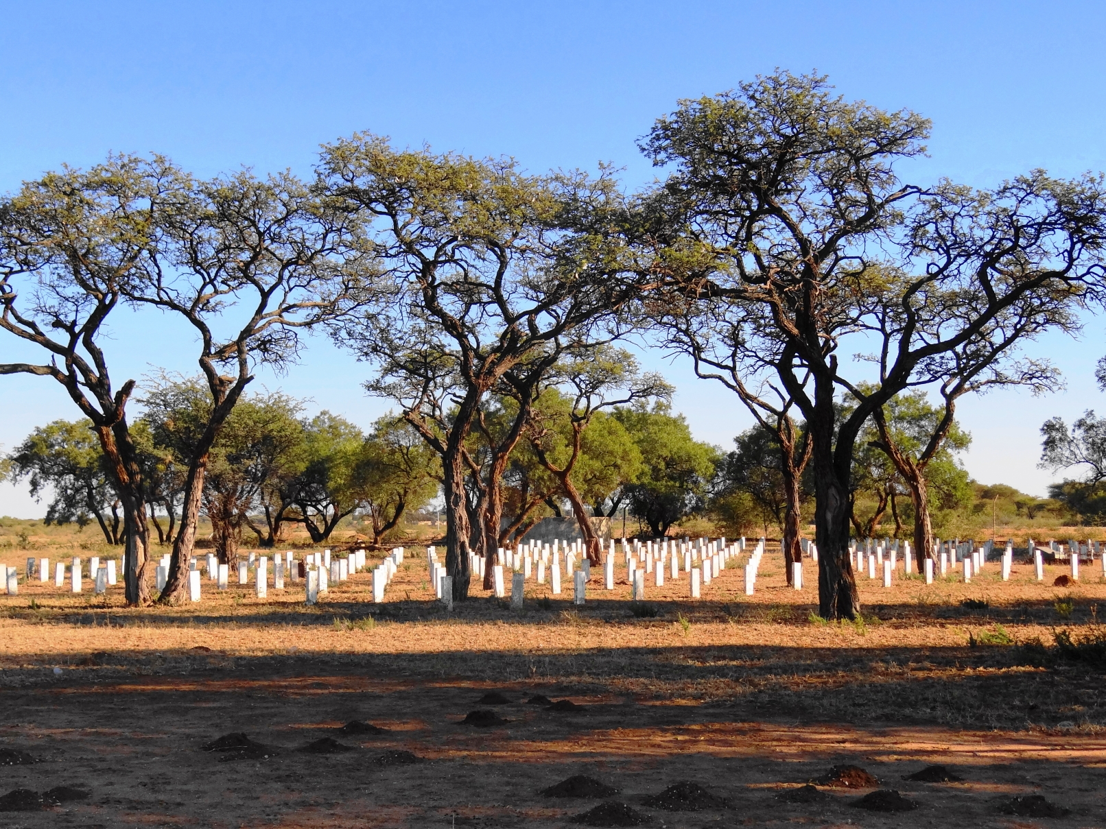 Krediet: Erfenisstigting